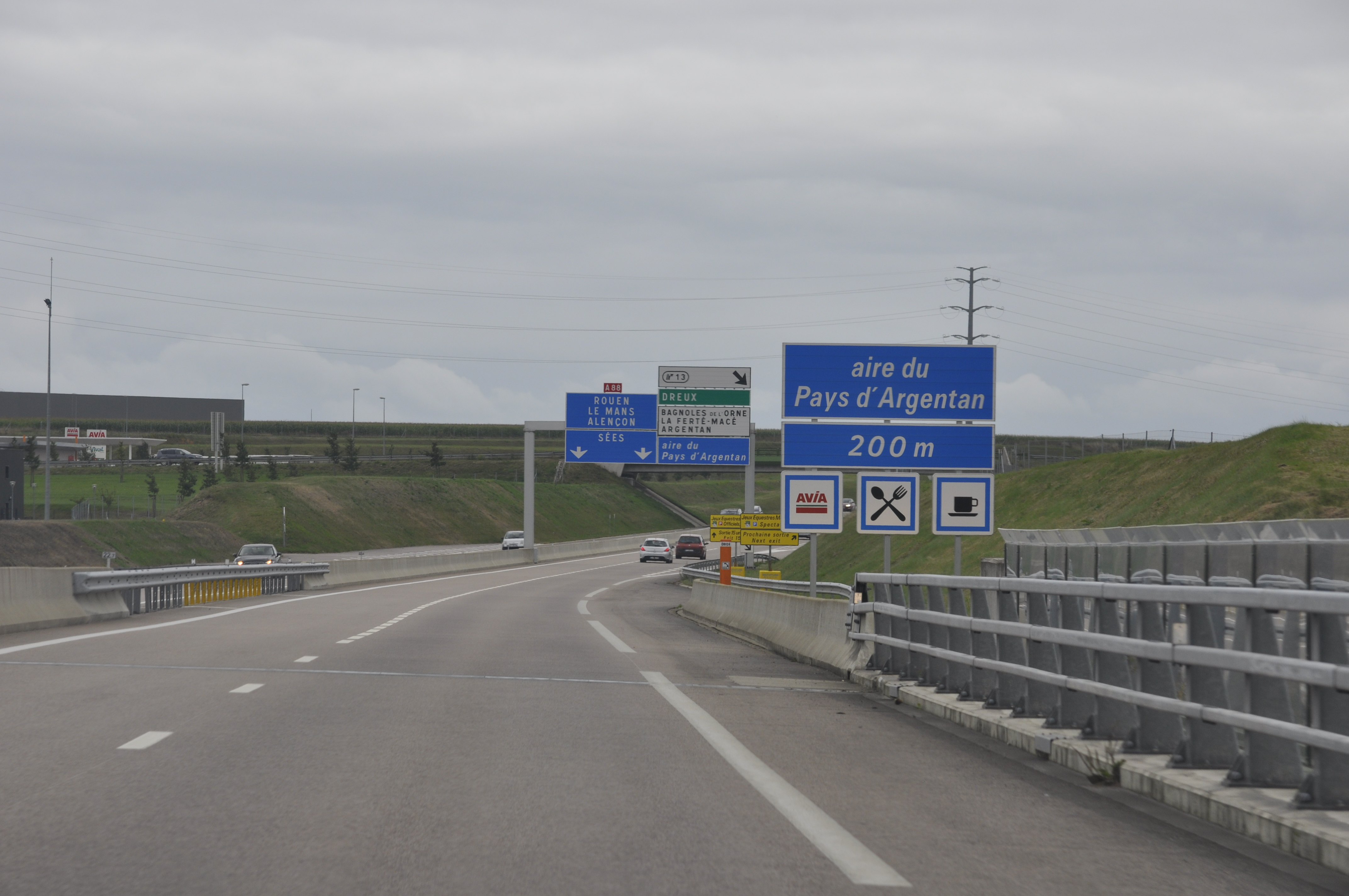 A88 panneau aire du pays d'Argentan